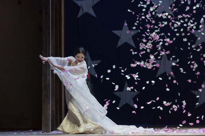 Լիանա Ալեքսանյանը Բաթերֆլայի դերում